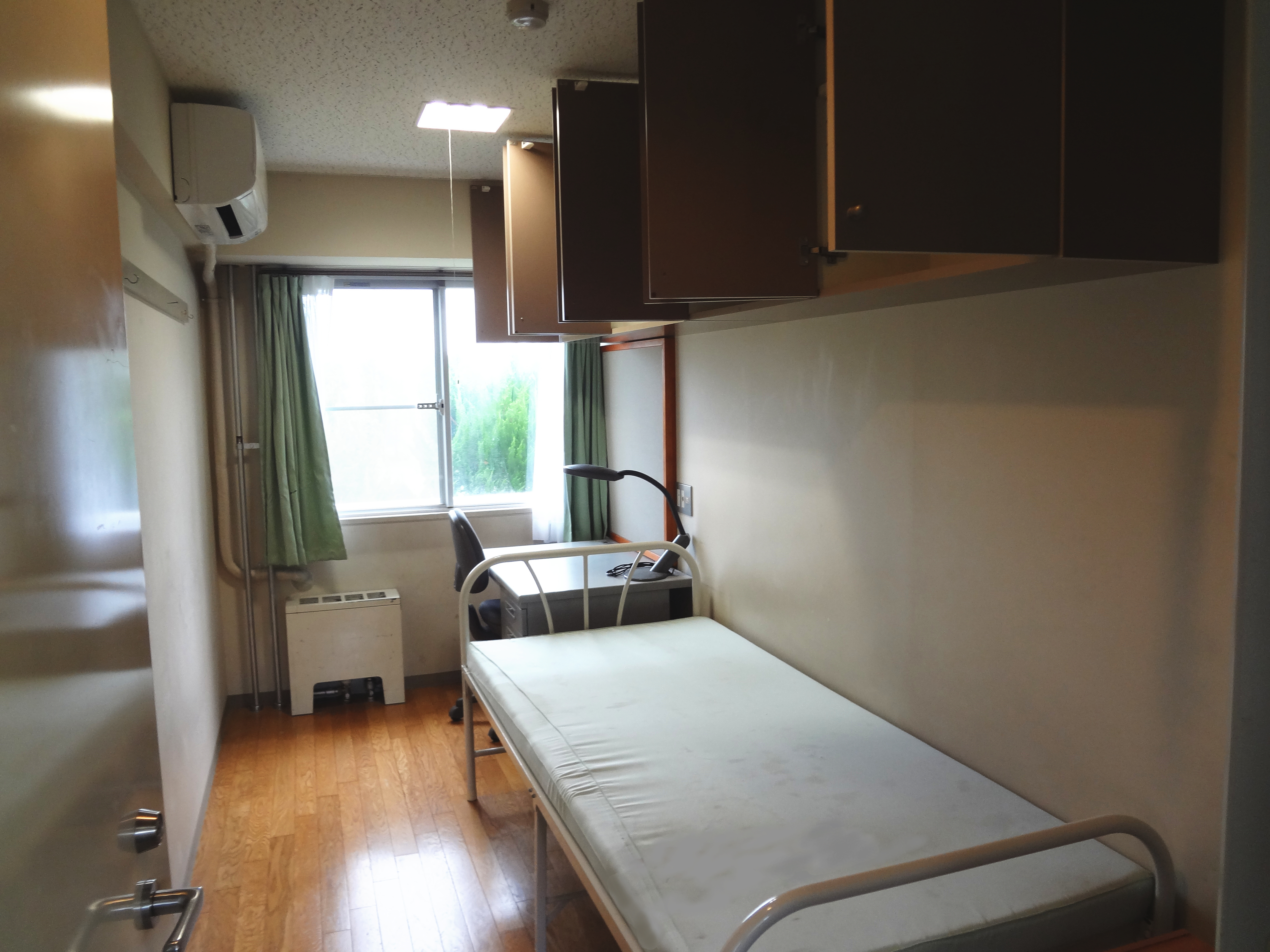 東京高専くぬぎだ寮第2棟室内